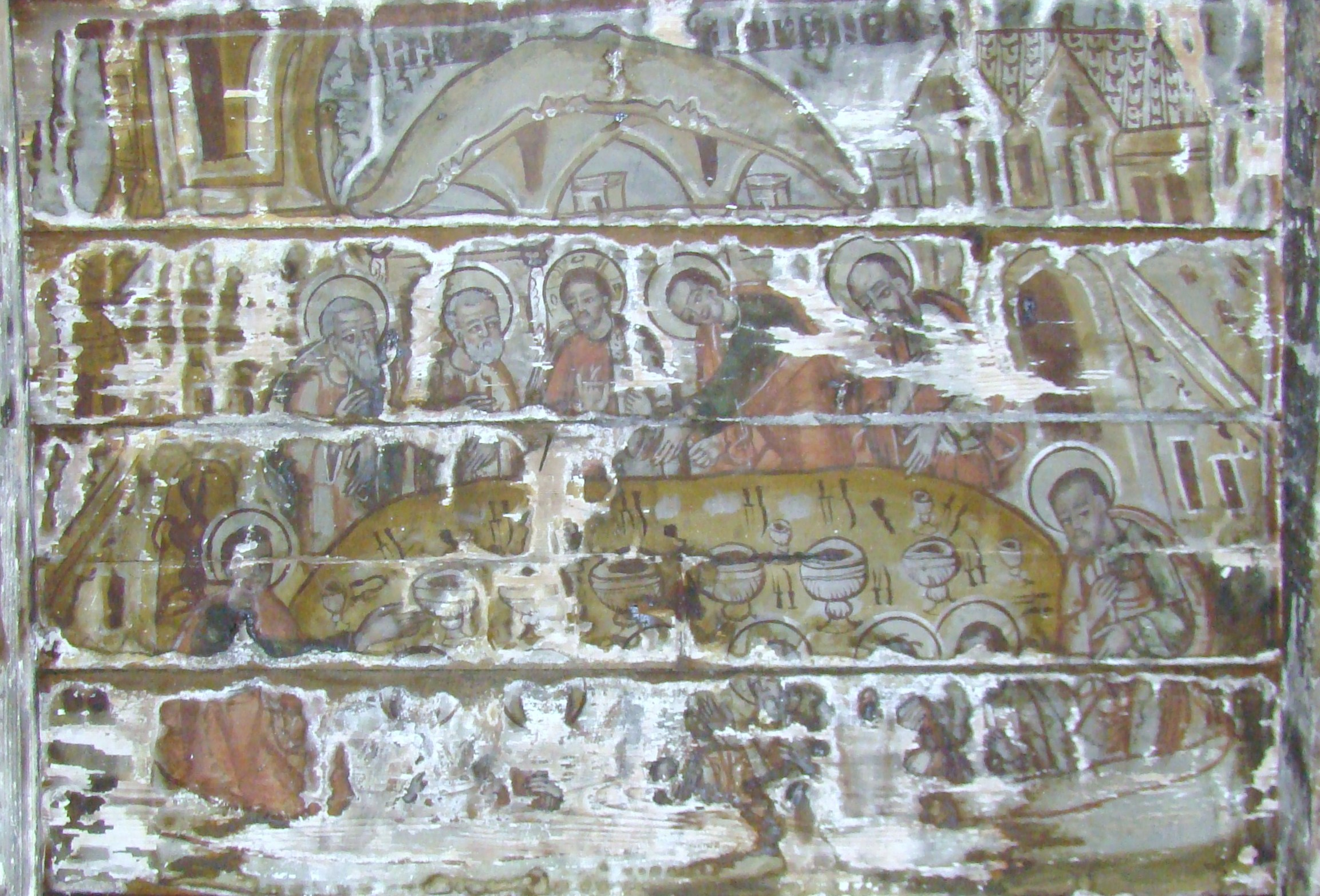 Biserica de lemn „Sfinții Arhangheli Mihail și Gavriil” din Sângătin, comuna Apoldu de Jos, județul Sibiu